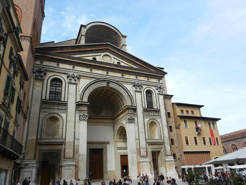 Mantova - Basilica di S. Andrea